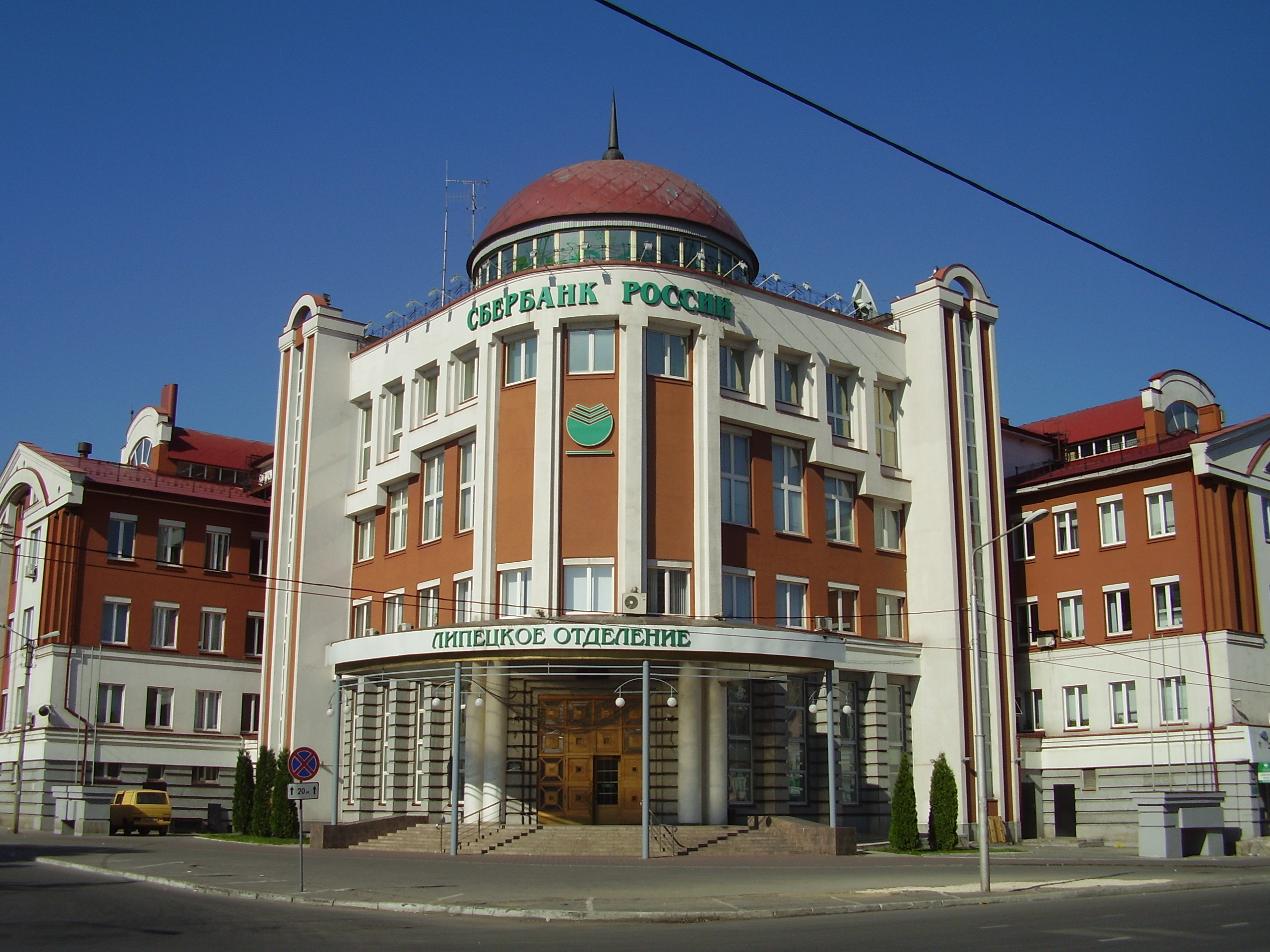 Липецк,здание сбербанка